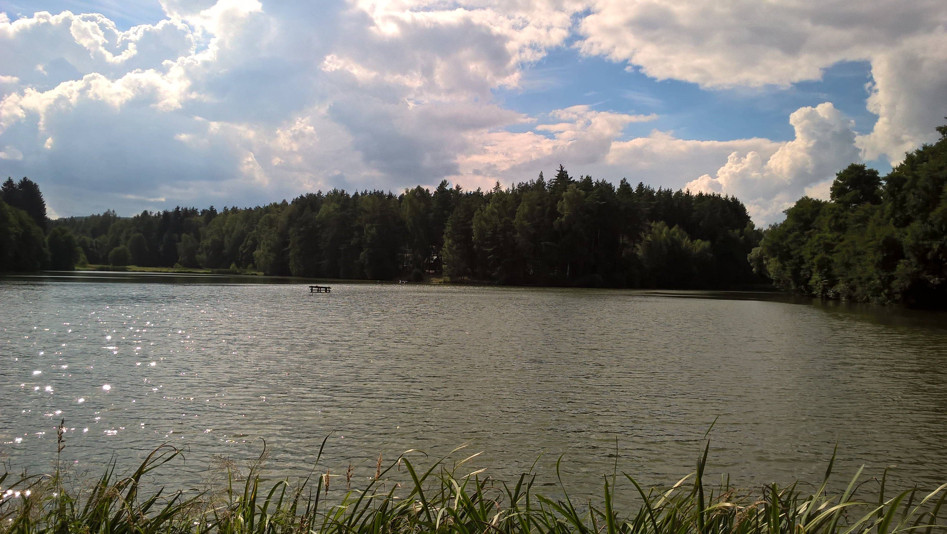 také nazýván Ředkovec či Ředkovák